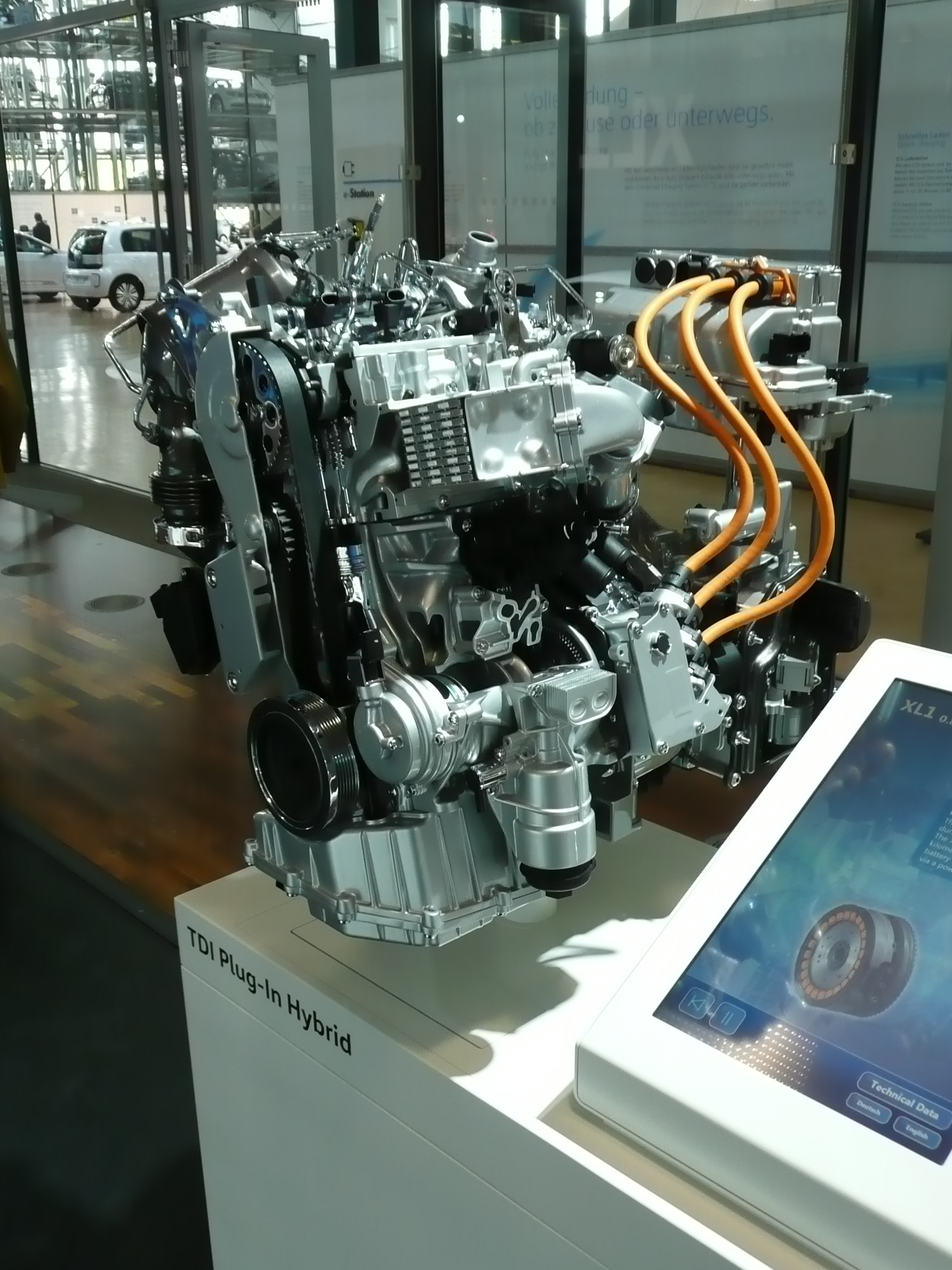 Hybrid-Antrieb des Volkswagen XL1, ausgestellt in der Gläsernen Manufaktur